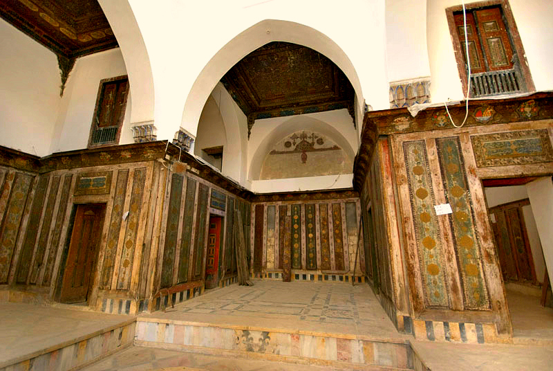 palazzo ghazaleh